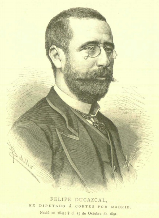 Felipe Ducazcal, ex diputado a Cortes por Madrid.